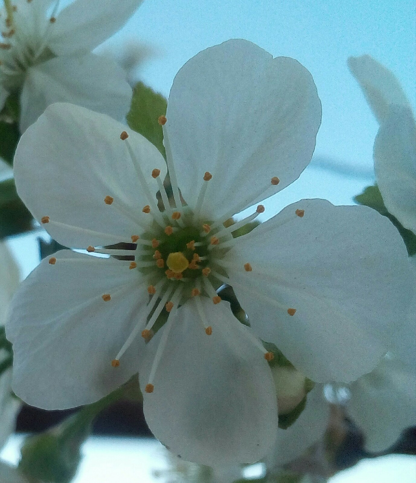 цветок черешни с пятью лепестками